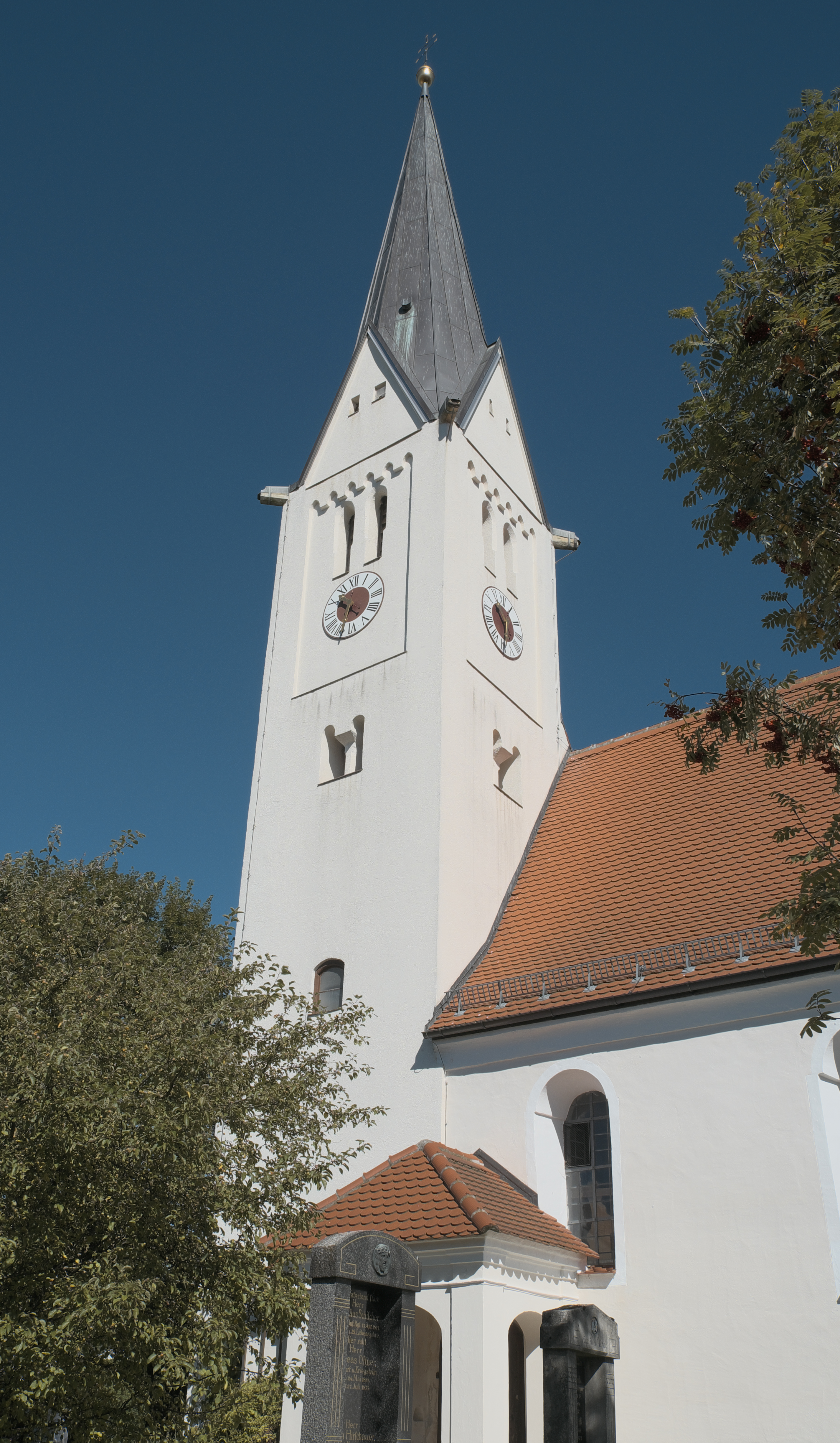 Katholische Pfarrkirche St. Johannes der Täufer in Rott im Landkreis Landsberg am Lech (Bayern/Deutschland)